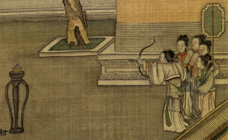 中文（香港）: 第一開〈射粉團〉：唐宮中，造粉團、角黍（粽子），飣盤中，以小弓射之，中者得食。